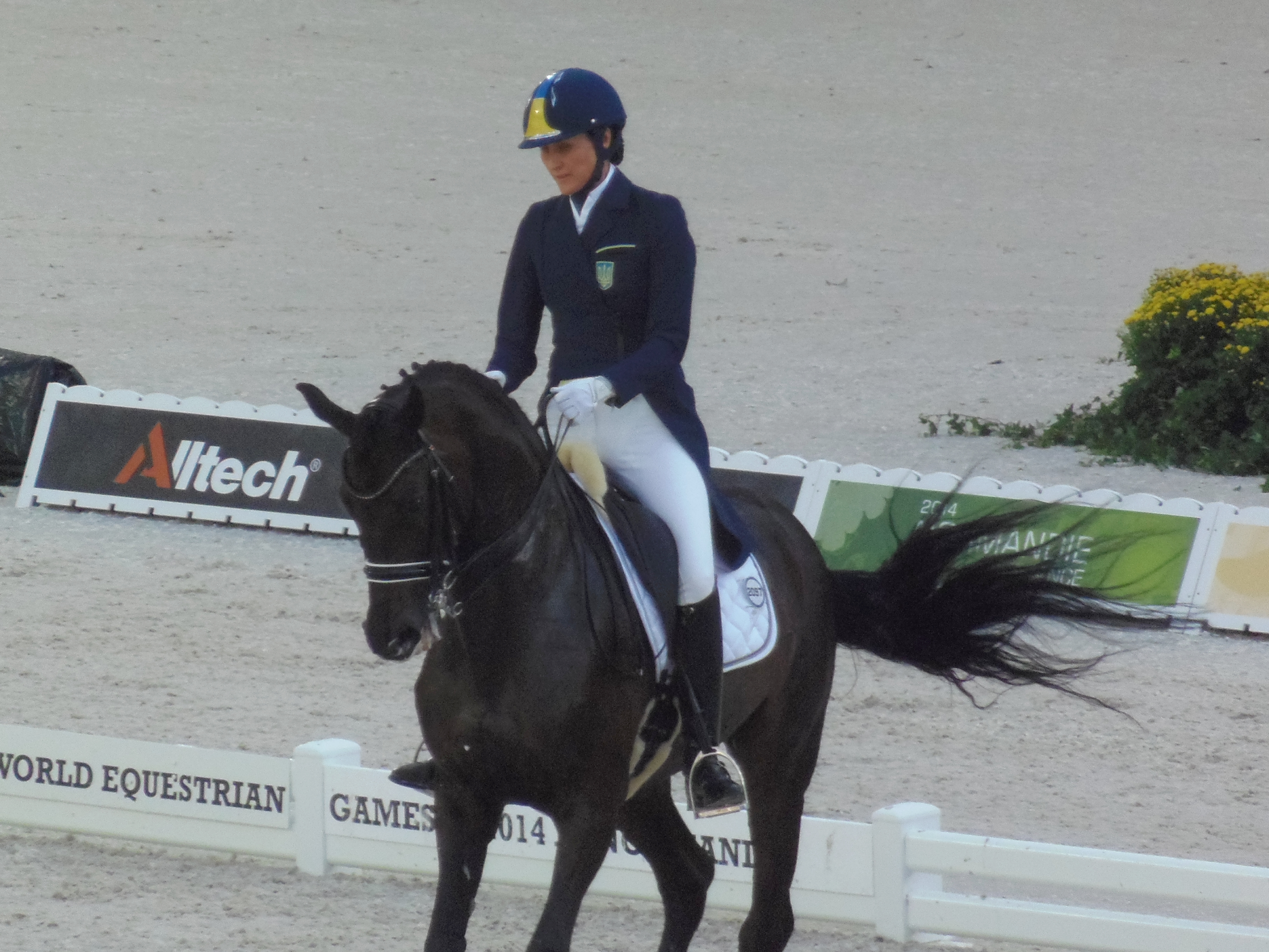 Svetlana Kiseliova en selle sur Parish lors des Jeux équestres mondiaux, le 26 août 2014 au stade d'Ornano à Caen (Normandie, France).